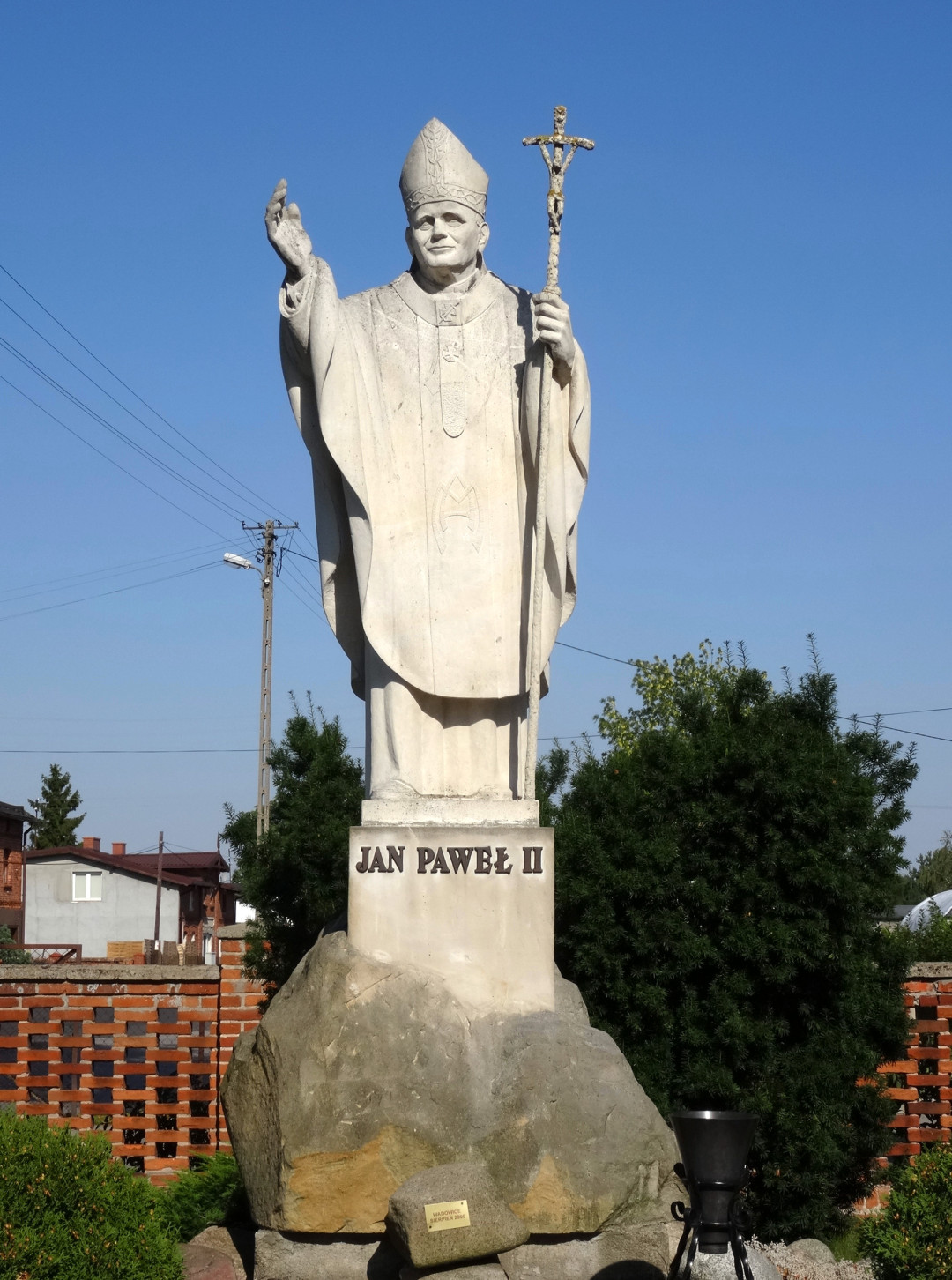 Pomnik Jana Pawła II w Czarżu, gmina Dąbrowa Chełmińska